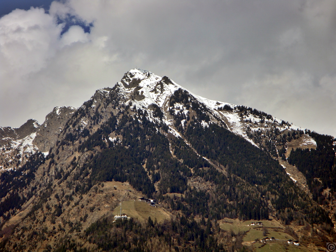 Cənubi Tirol: dağ mənzərəsi